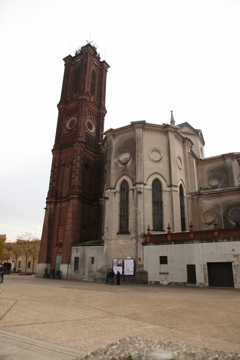 Galliate 11/2010